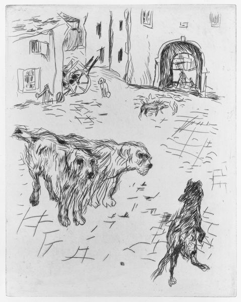 Eau-forte de Pierre Bonnard illustrant Dingo (1924) de Octave Mirbeau.